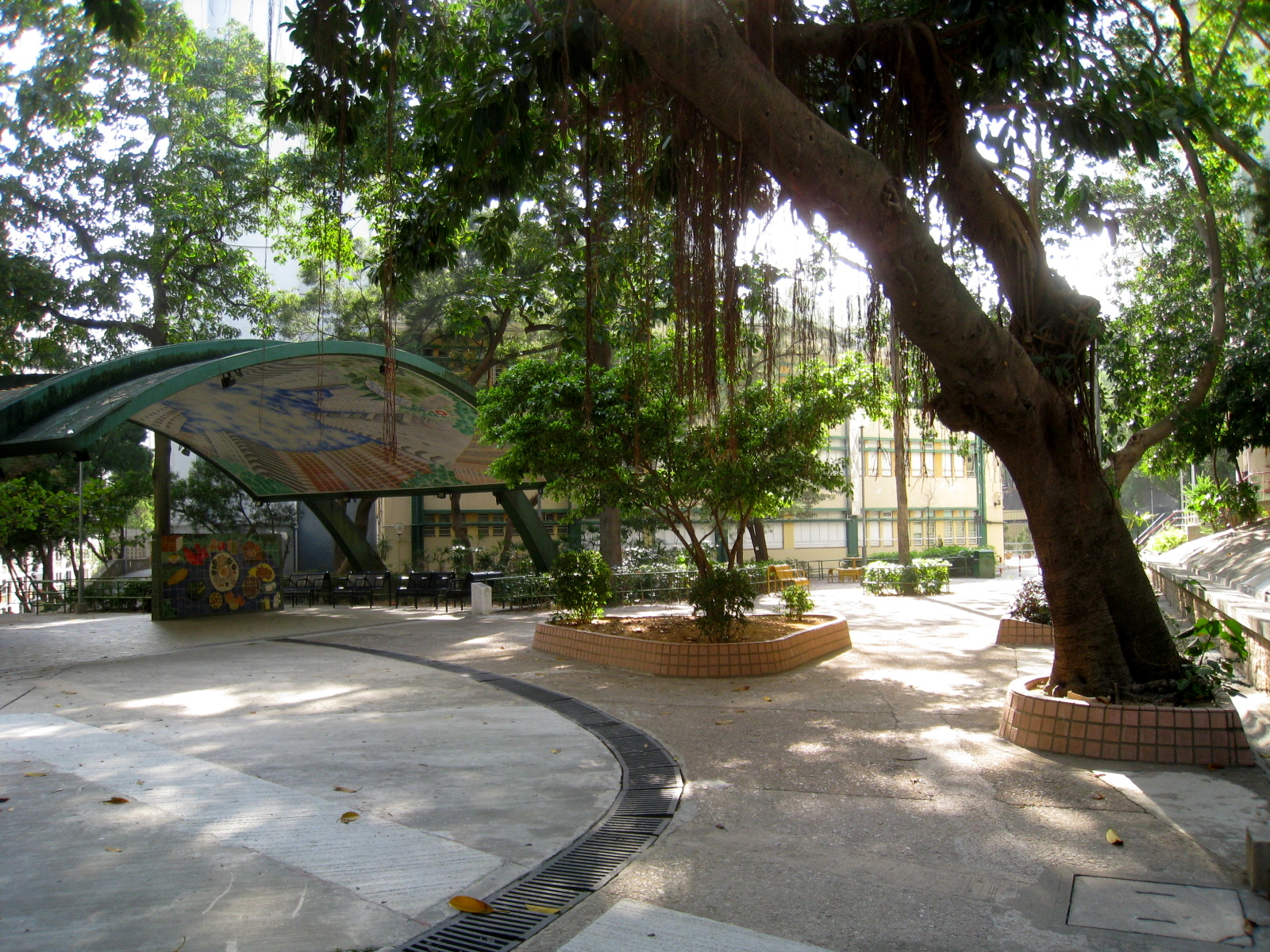 So Uk Estate Open Space 蘇屋邨